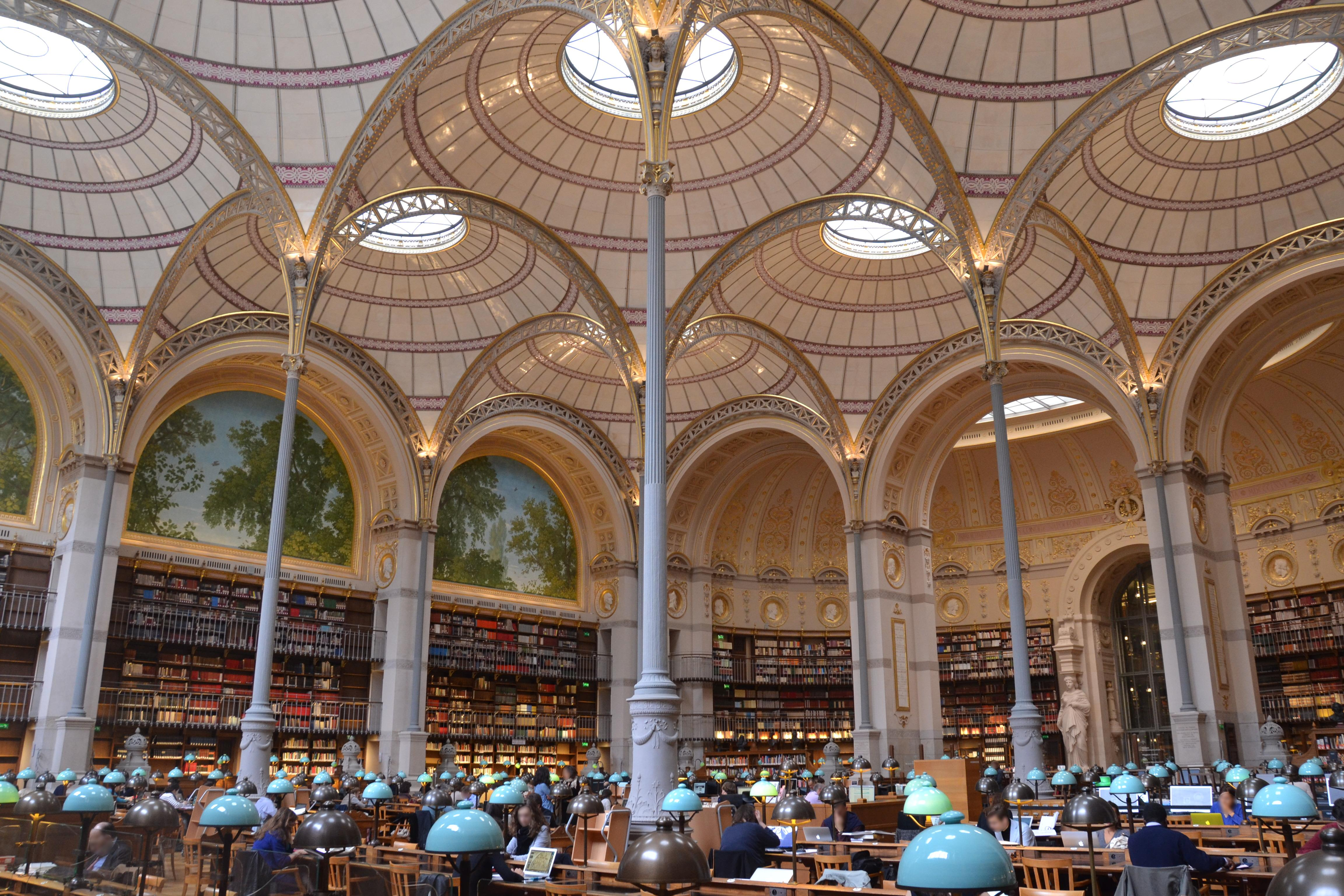 Salle de lecture de l'INHA, construite par Henri Labrouste au sein de la Bibliothèque nationale de France - site Richelieu.